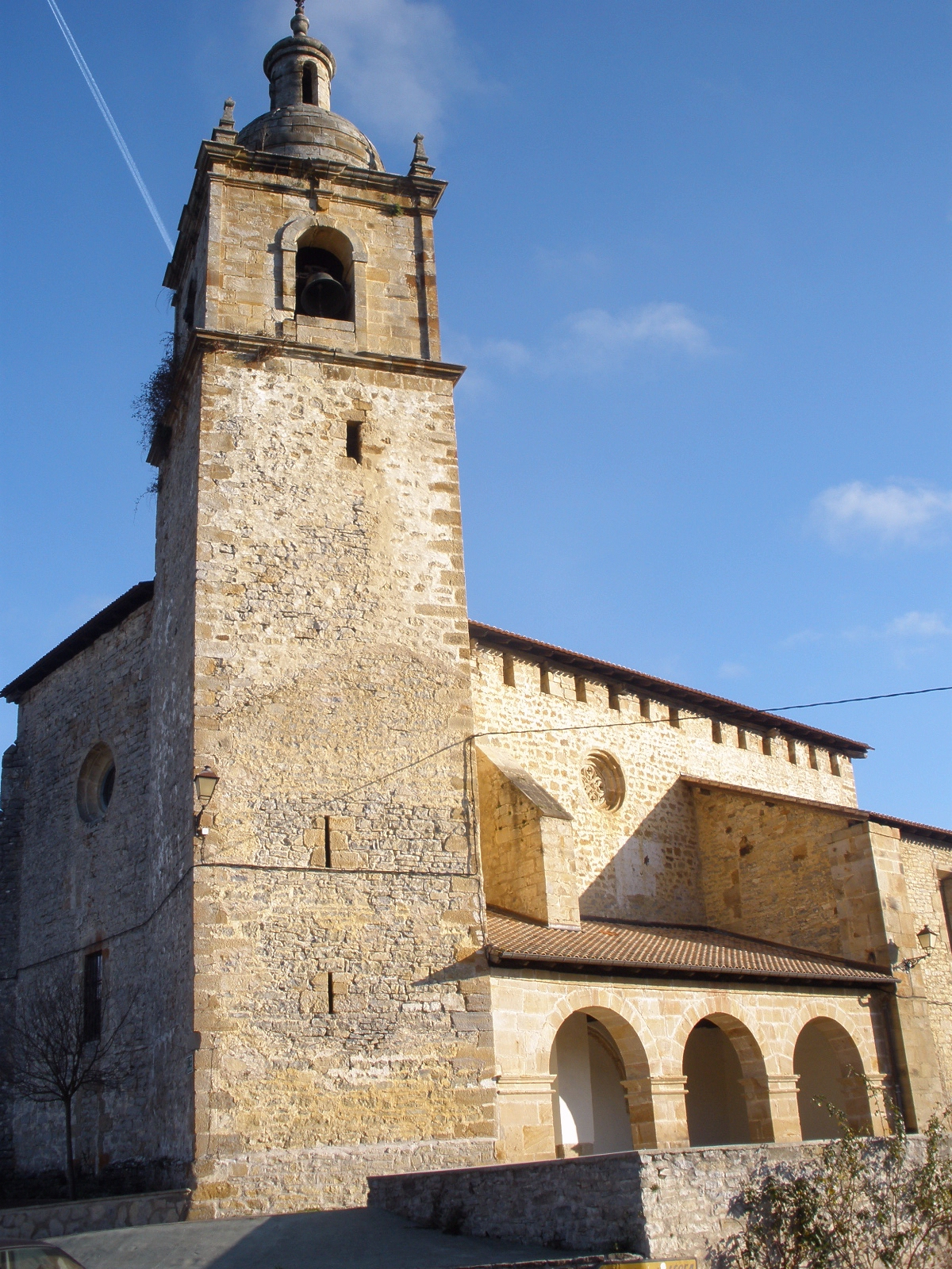 Larrea (Álava) - Iglesia de San Millan